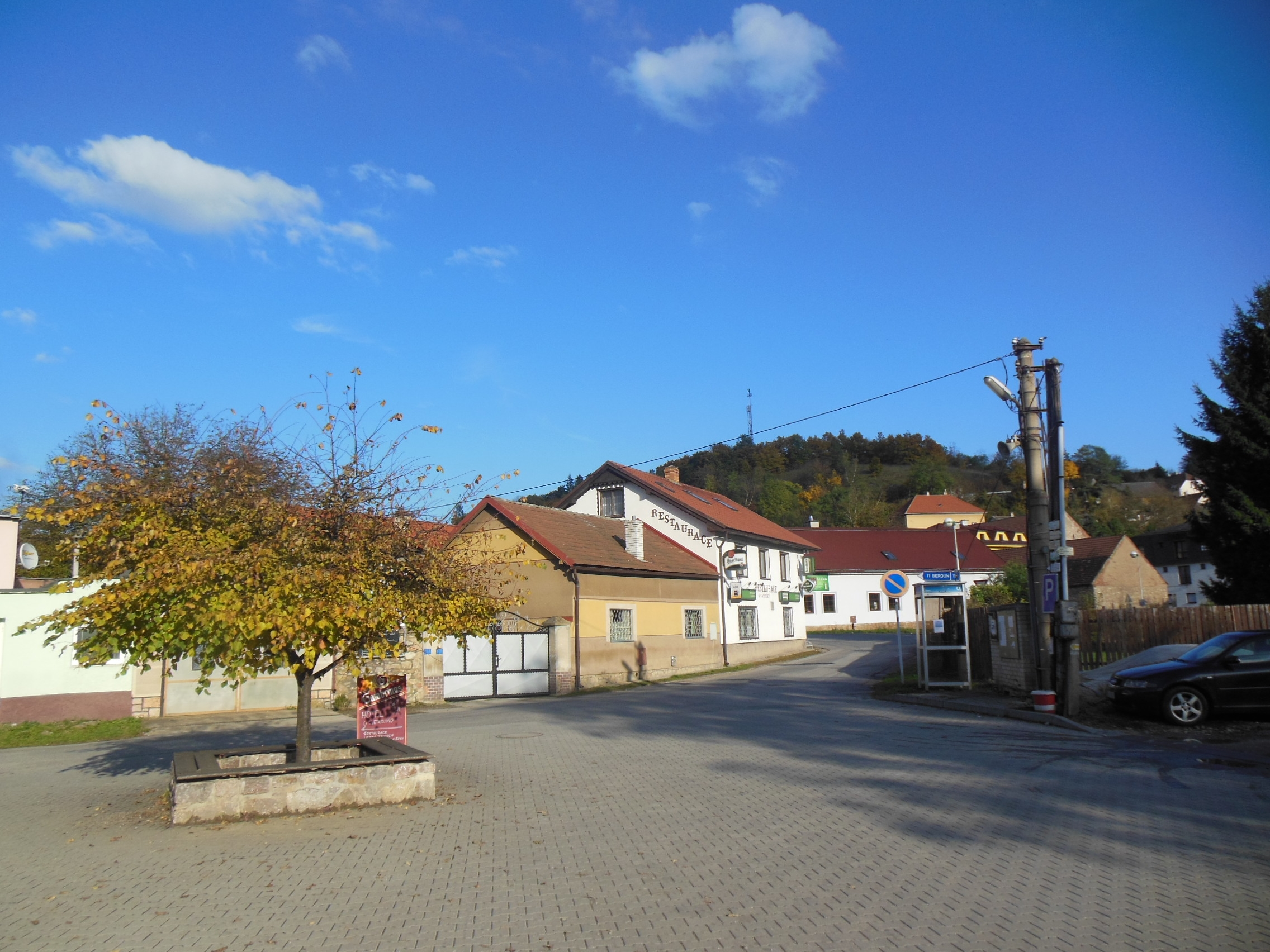 Srbsko (okres Beroun). Pohled od lávky.